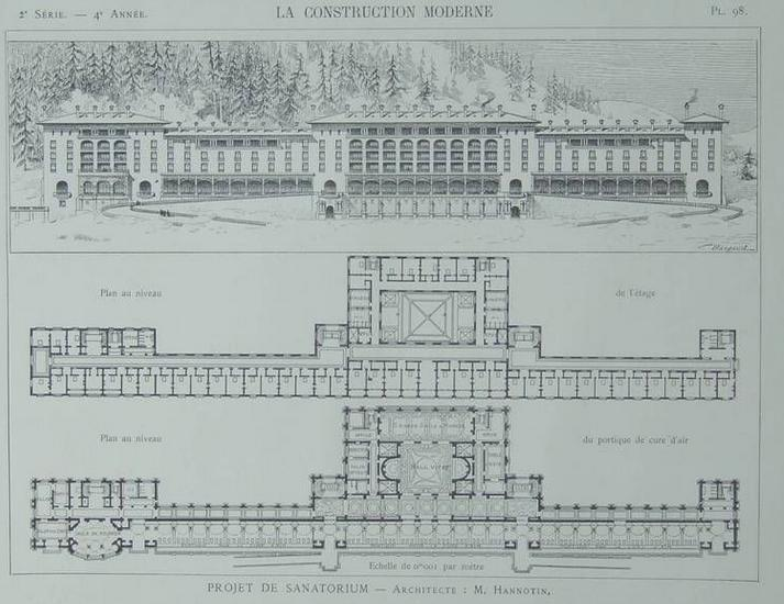 Projet de sanatorium de l'architecte Théophile-Albert Hannotin (1841-1909)